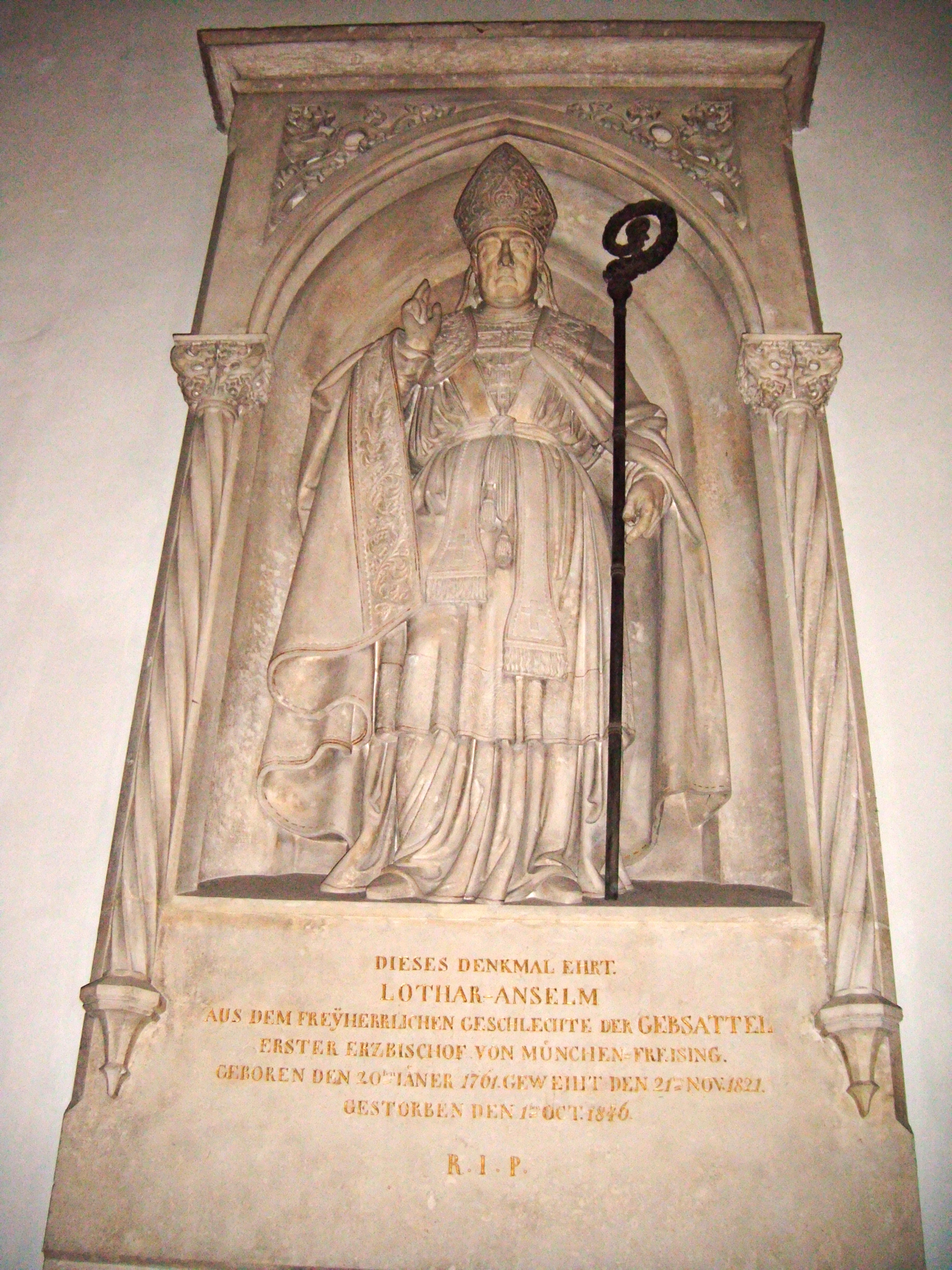 Lothar Anselm von Gebsattel (1761-1846), Epitaph von Ludwig von Schwanthaler (1802-1848), Frauenkirche, München